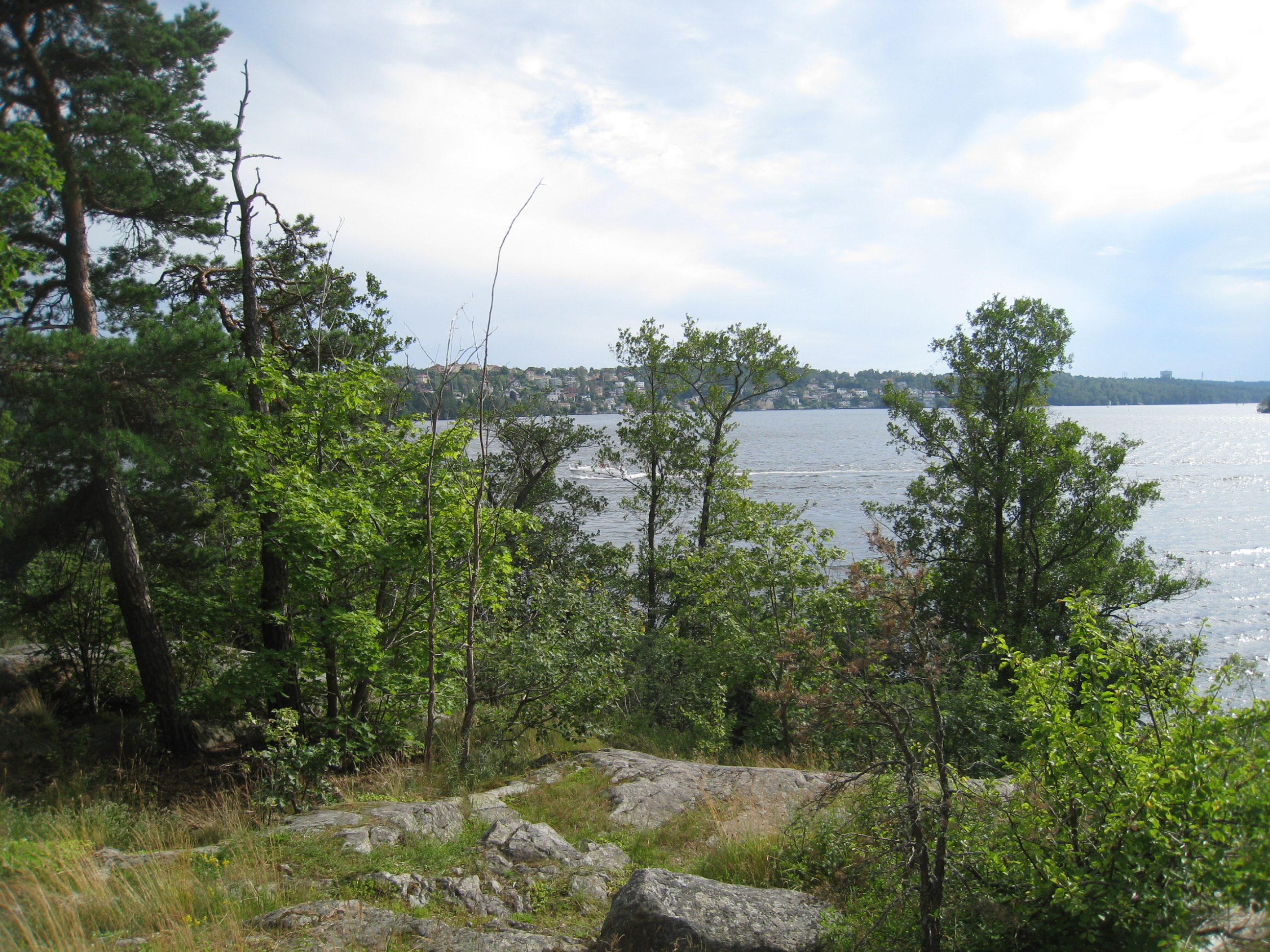 Ålstensskogens natur vid Mälaren i stadsdelen Ålsten i södra Bromma, väster om Stockholm.